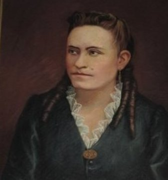 Trinidad María Enríquez, escritora cusqueña y primera universitaria peruana